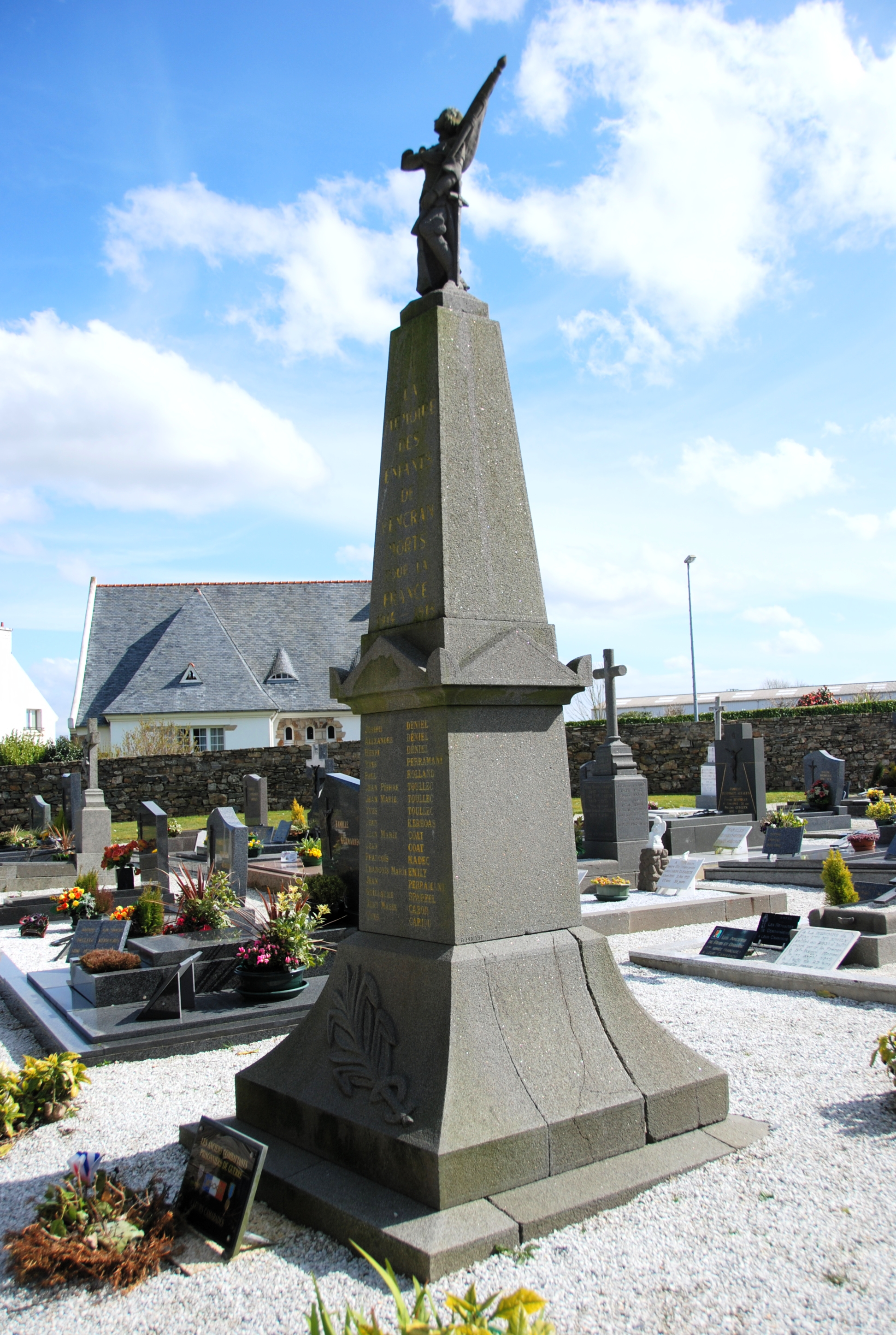 Monument aux morts - Pencran-29_1